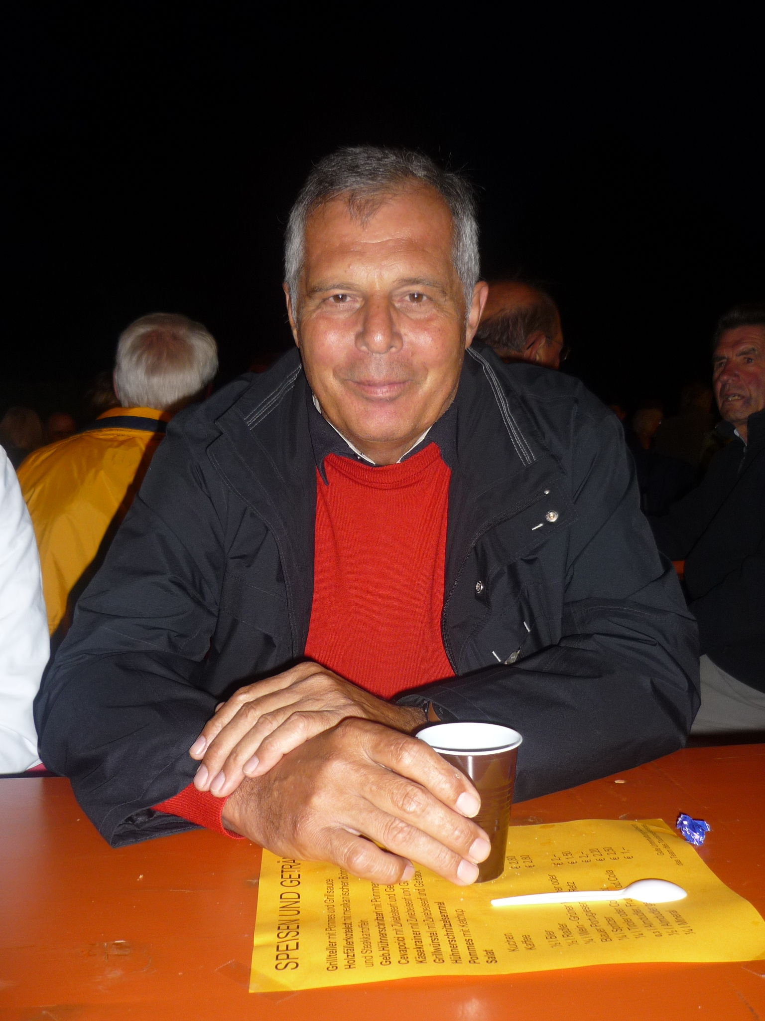 Bürgermeister der Gemeinde Puchberg am Schneeberg, Michael Knabl (SPÖ)